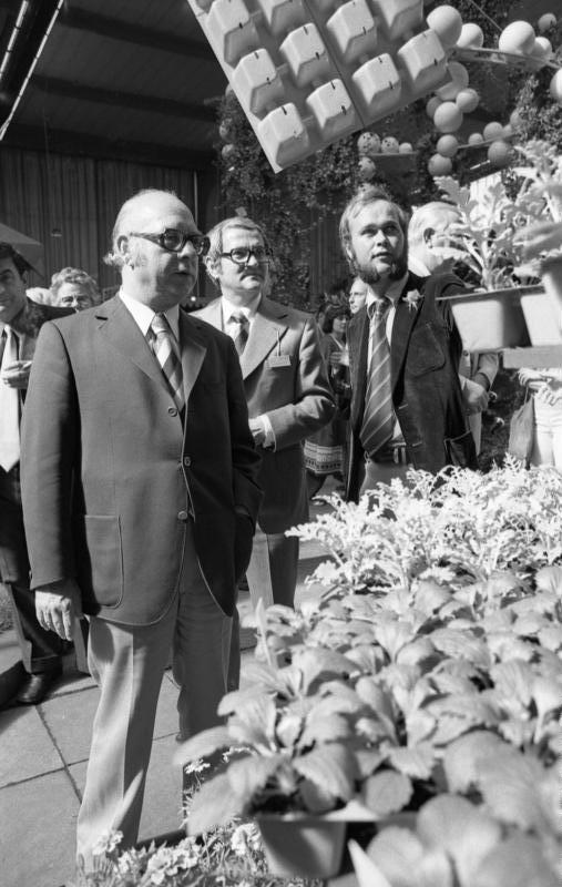 This description has been identified as biased or incorrect: Der Mann im Vordergrund ist der damalige Bundeslandwirtschaftsminister Josef ErtlSt.S. Hans Jürgen Rohr besucht die Internationale Gartenbau Ausstellung (IGA) in Hamburg